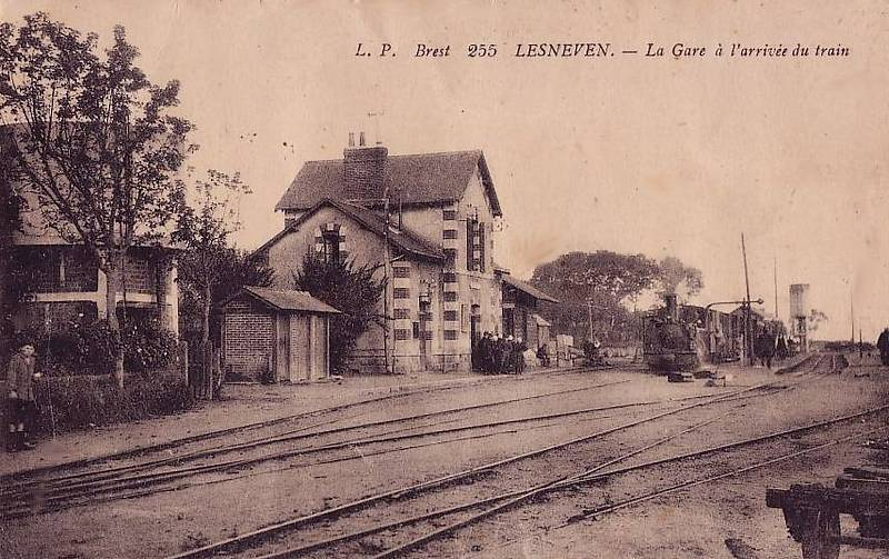 La gare de Lesneven (Chemins de fer départementaux du Finistère)